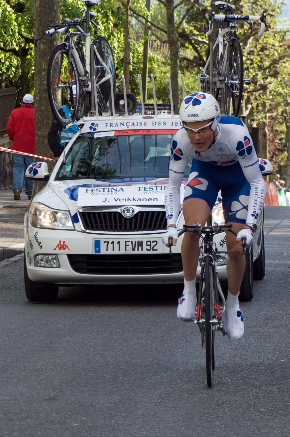 Jussi Veikkanen au Tour de Romandie 2009 - prologue